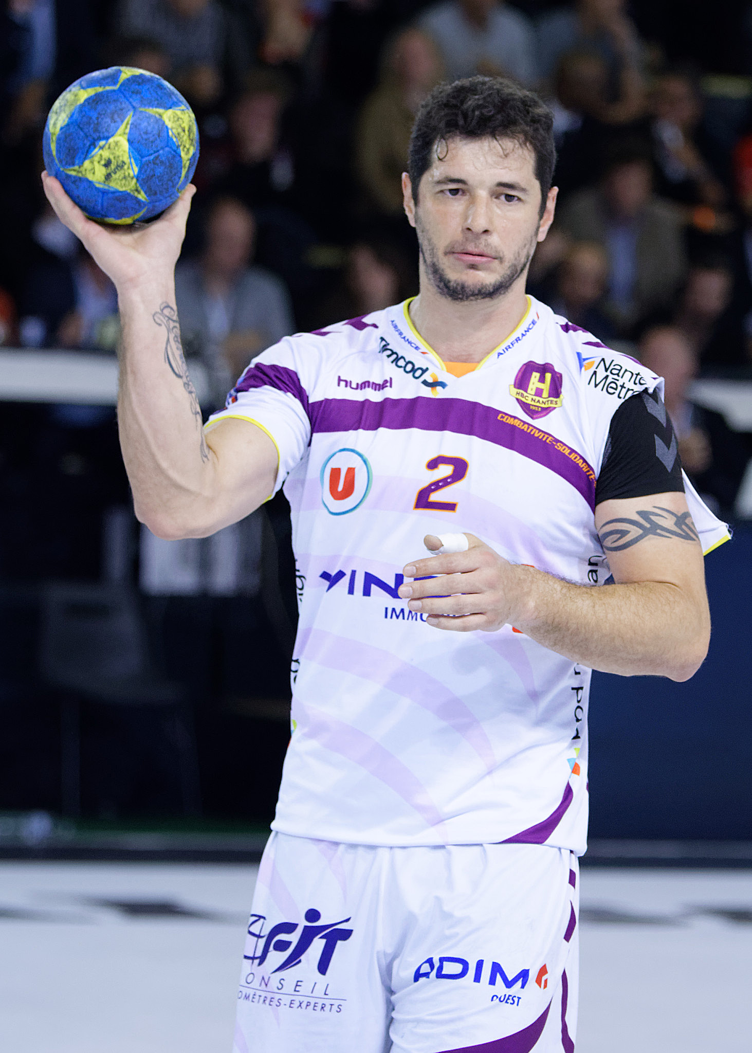 Rencontre de LNH entre l'US Ivry et le HBC Nantes. A Ivry, le 18 novembre 2015.